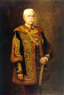 Cziráky Béla kamarás, főispán, főudvarnagy.